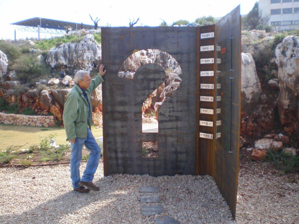 מיצג של חמיצר האוצר האקדמי מכללת בראודה